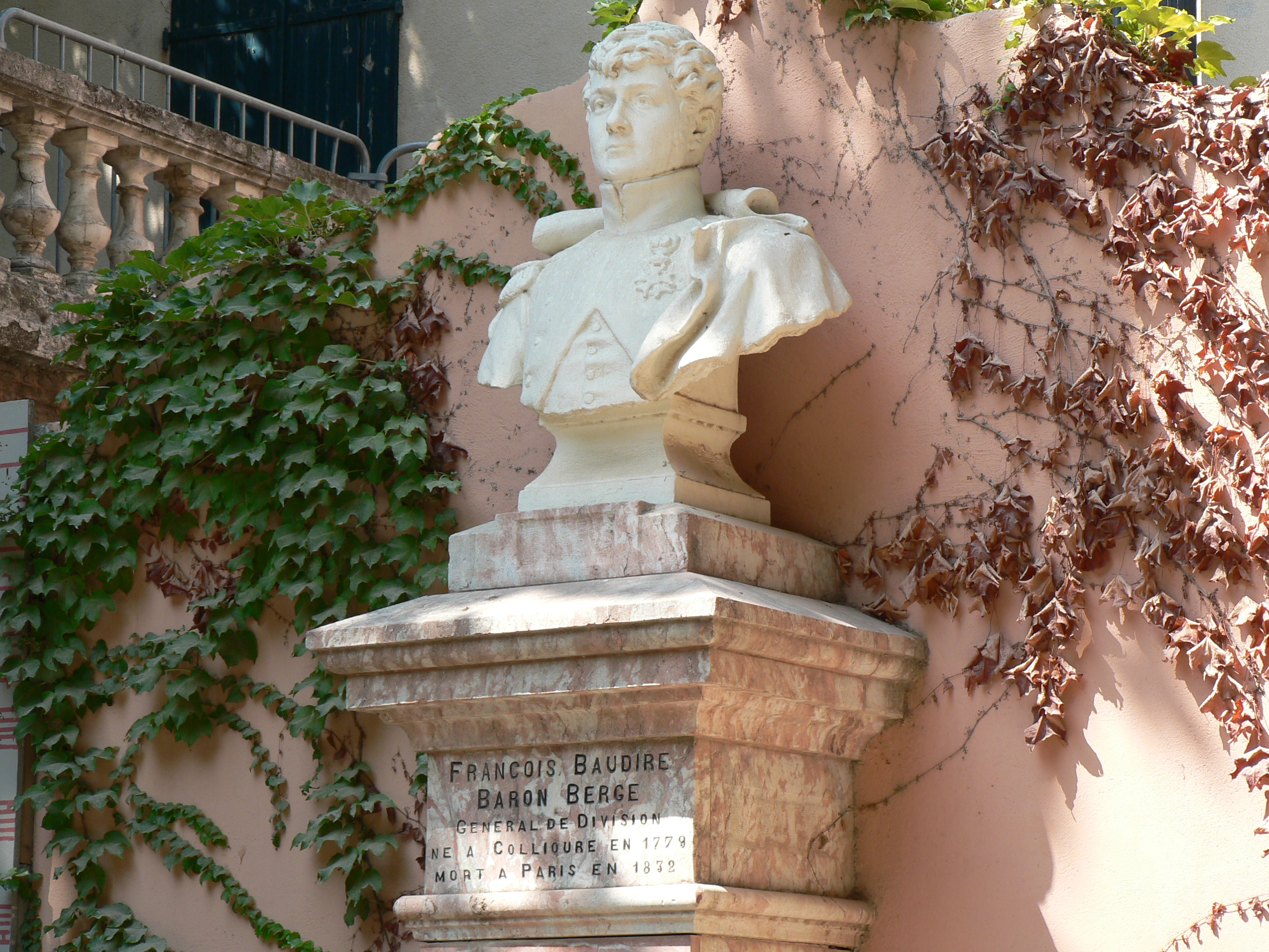 Buste de François Baudire baron Berge à Collioure